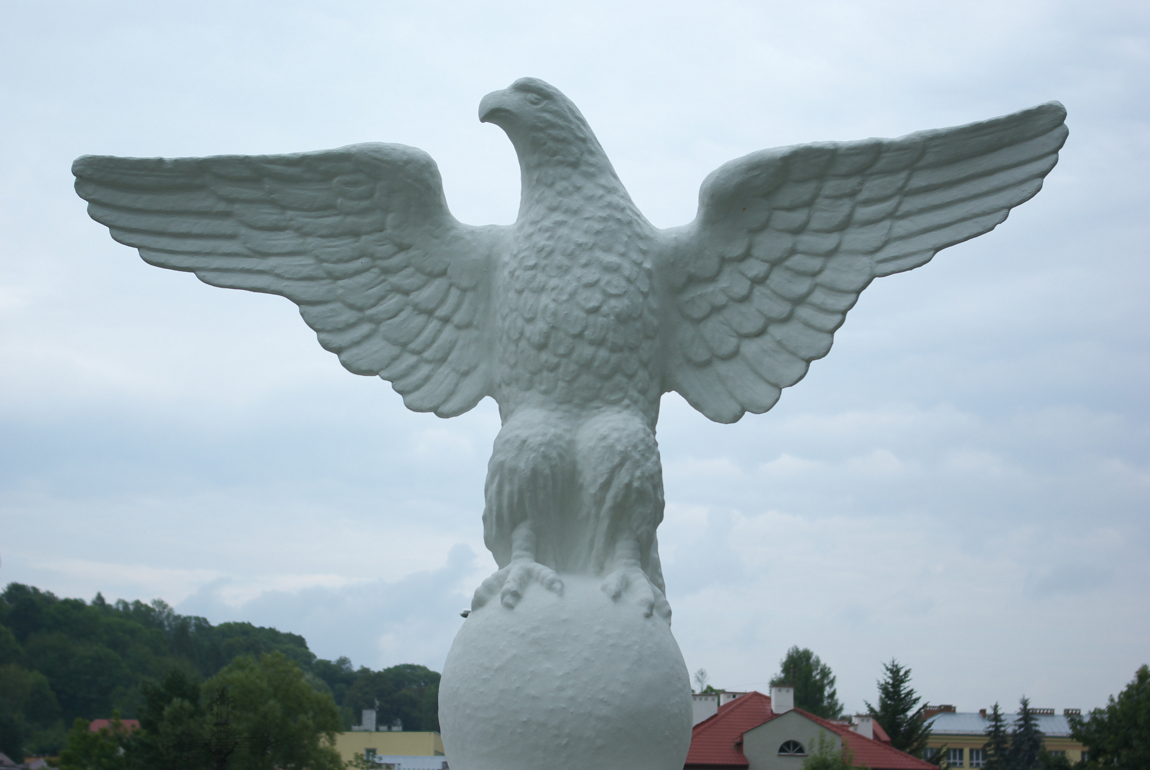 Mogiła rozstrzelanych na górze Gruszka w 1942 roku, na Cmentarzu Centralnym w Sanoku. Rzeźba Sokoła autorstwa Stanisława Jana Piątkiewicza